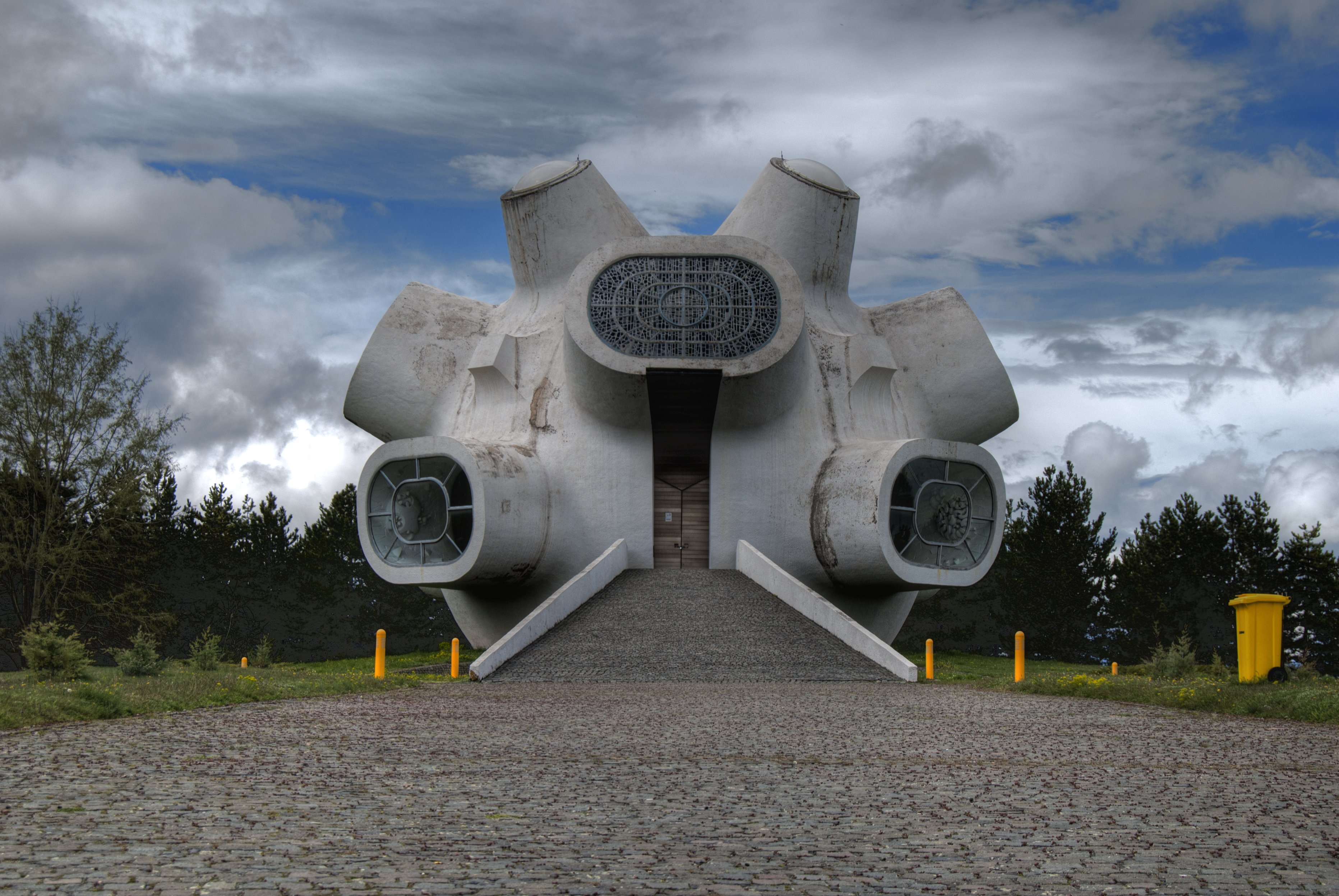 „Илинден“ или Македониум - споменички комплекс во Крушево.